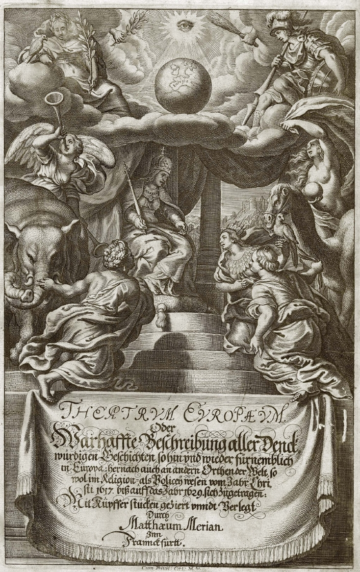 Frontispiz